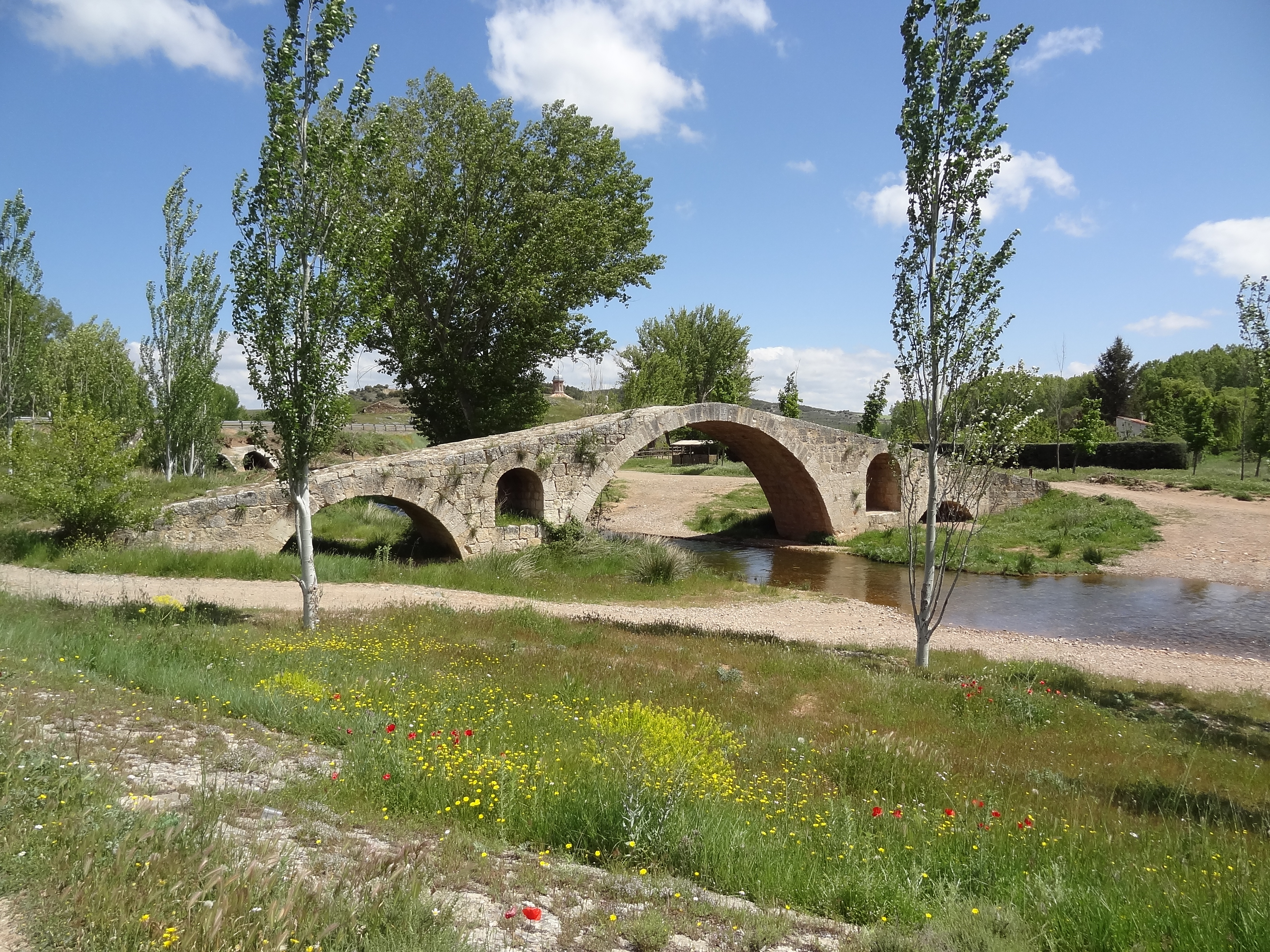 Imagen del puente romano de Luco de Jiloca en Teruel sobre el río Pancrudo